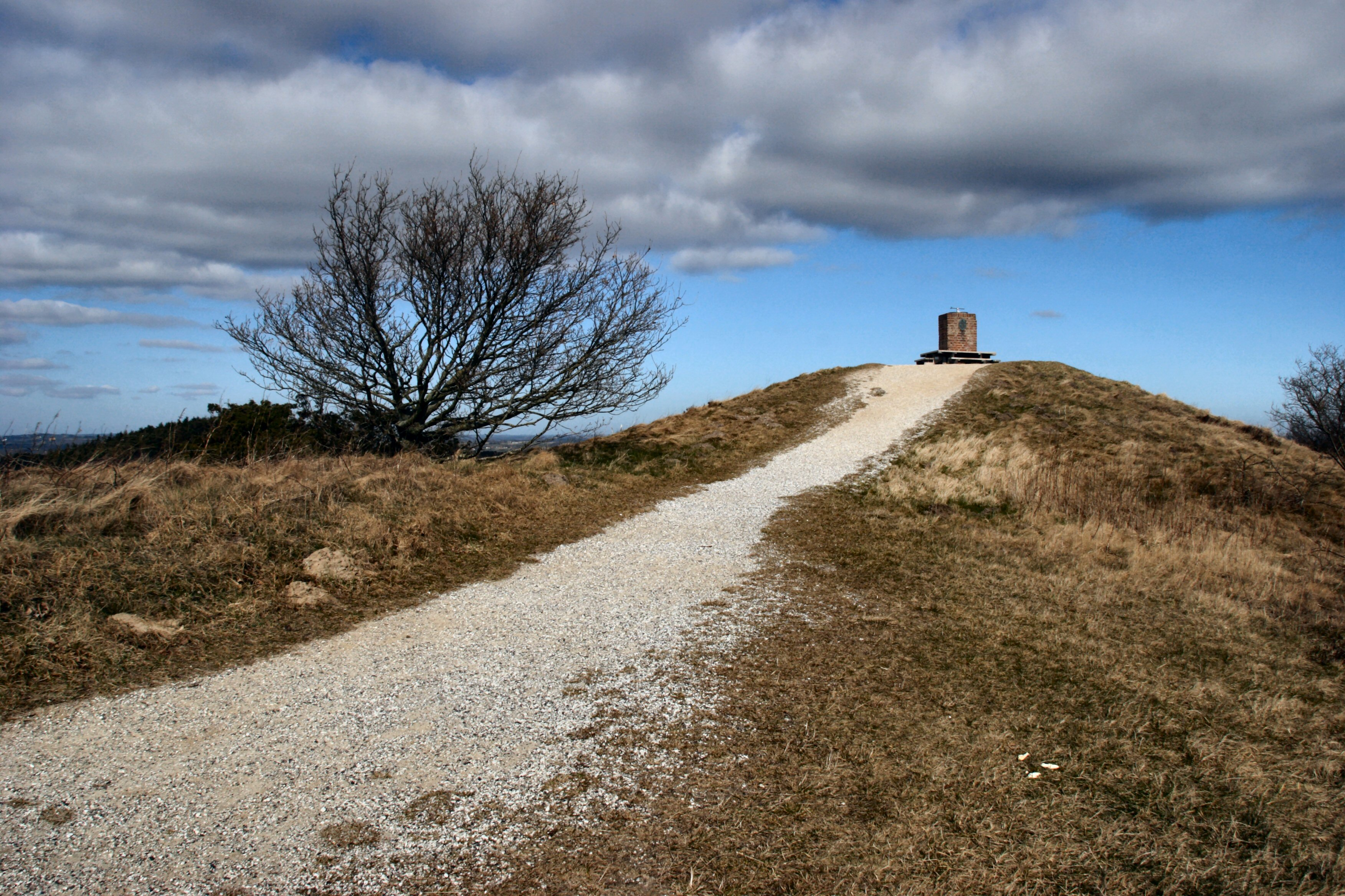 Agri Baunehøj